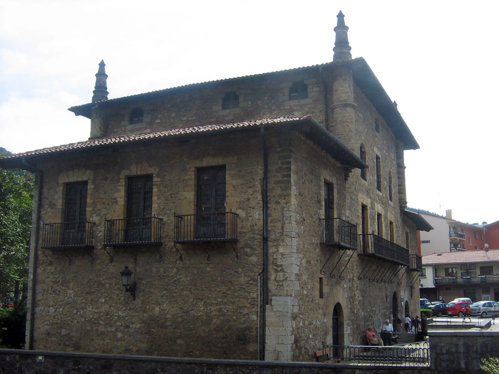 Casa-Torre Enparan, en el municipio de Azpeitia (Guipúzcoa / Gipuzkoa). Se trata de una de las edificaciones más destacadas de la localidad.